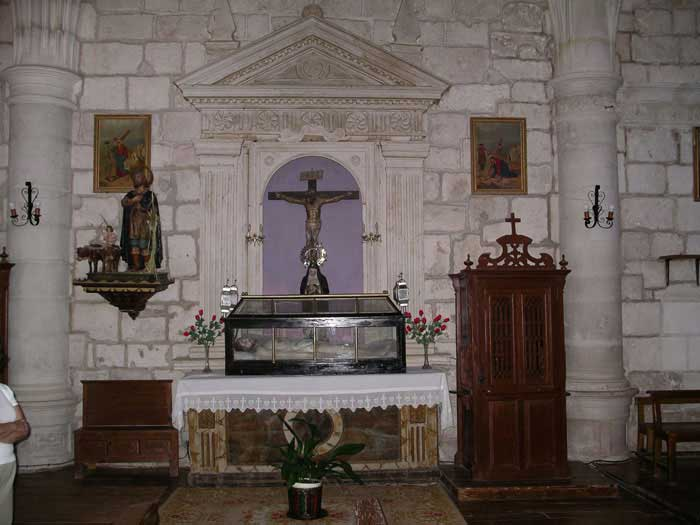 Retablo colaterale del Santo Cristo